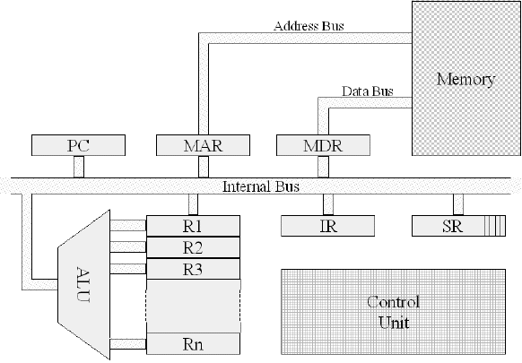 Autore: Marcello Esposito Fonte: Ho fatto io l'immagine Descrizione: Architettura di principio di un processore basato su registri generali Licenza d'uso: GFDL fatta da me Note: sono un docente dell'Università Federico II di Napoli e questa mia immagine è contenuta in molti dei corsi svolti presso l'ateneo da me e da altri miei colleghi (compreso il corso Borea5 per gli ingegneri aereonautici). Licensing OTRS #2007030810014998